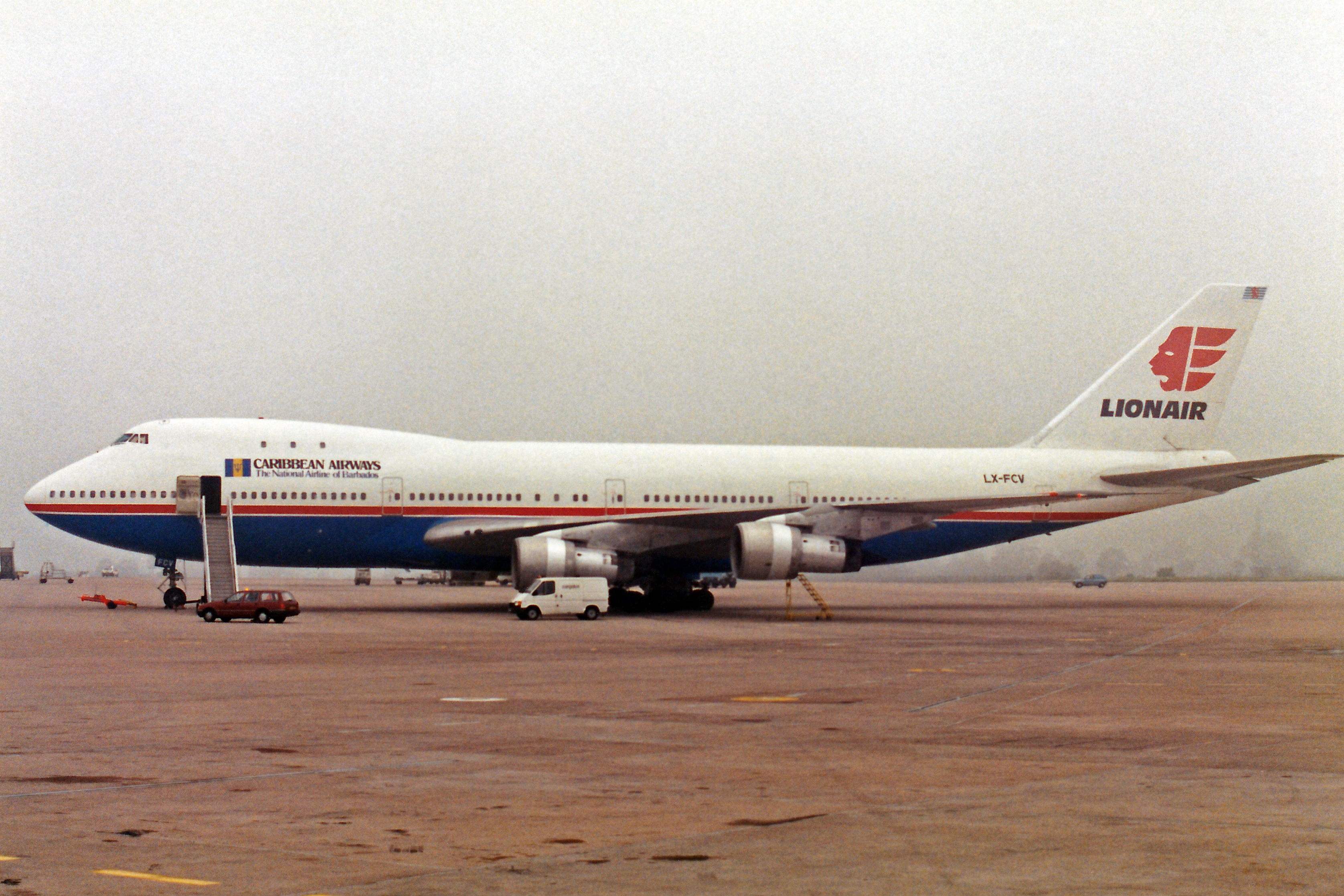 LX-FCV B747-121 Lionair(Cargolux) MAN JUN88